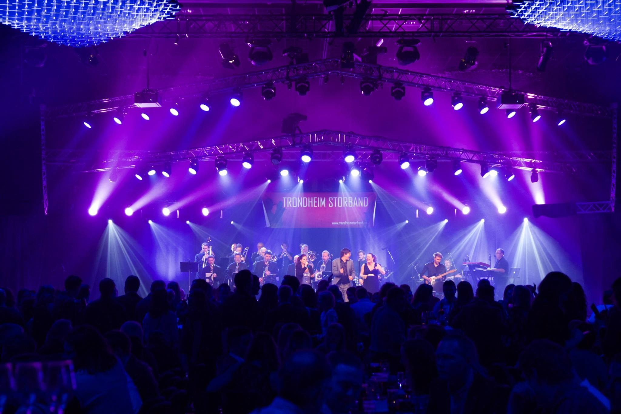 Trondheim Storband